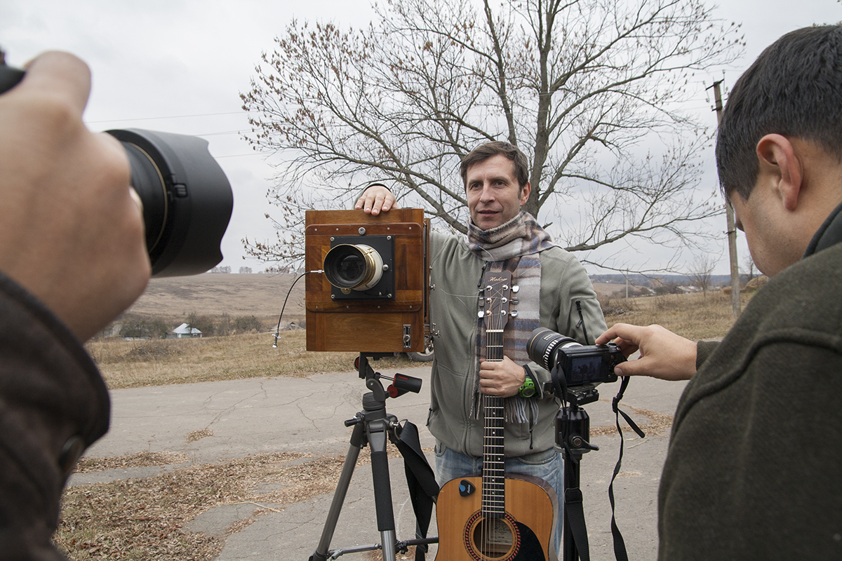 Пленер Банячки, 2011 рік (с. Вороновиця, Вінницька обл)